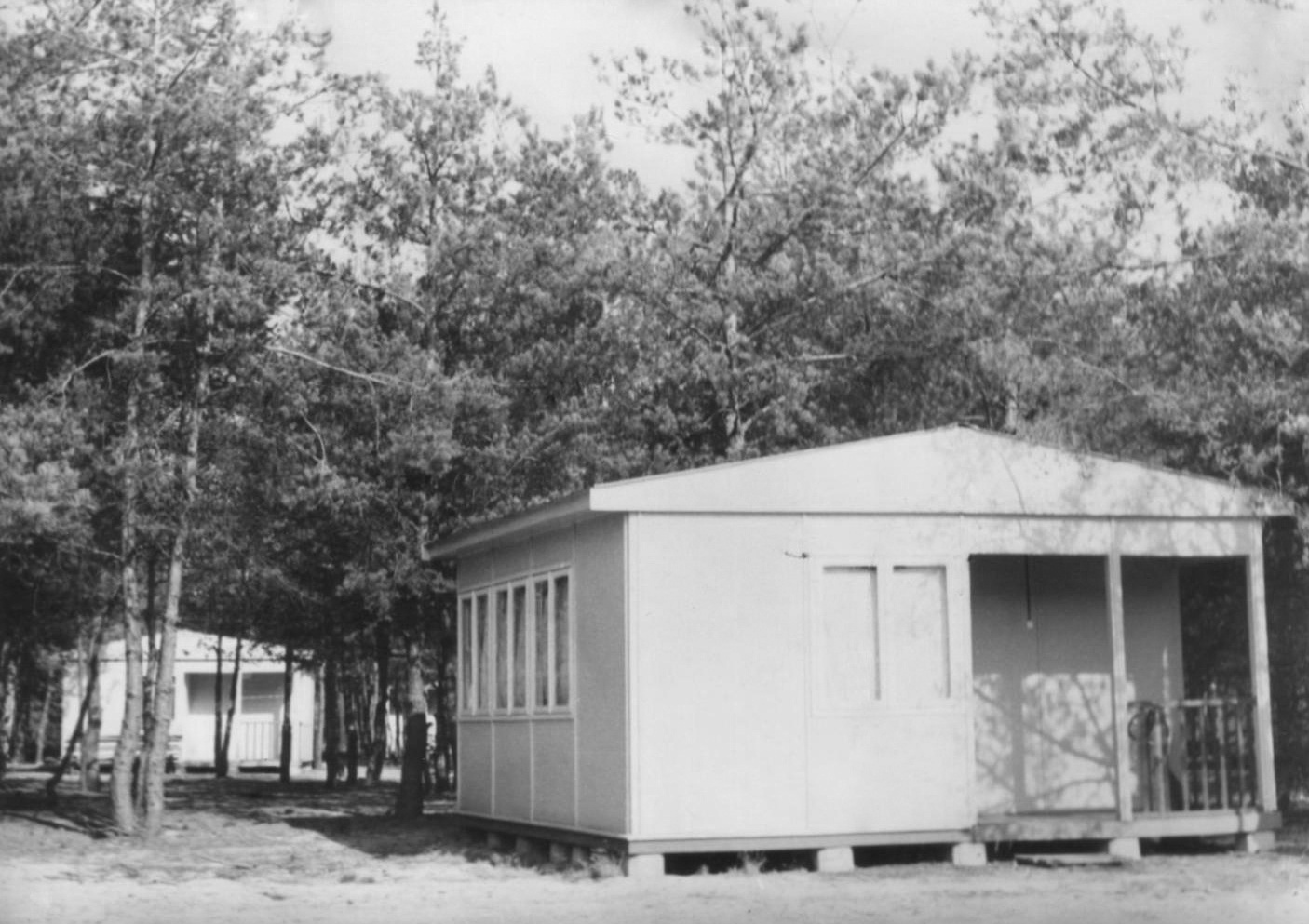 Domki kempingowe na ośrodku wypoczynkowym Przedsiębiorstwa Robót Montażowych Chemomontaż w Białej Górze - domki kempingowe